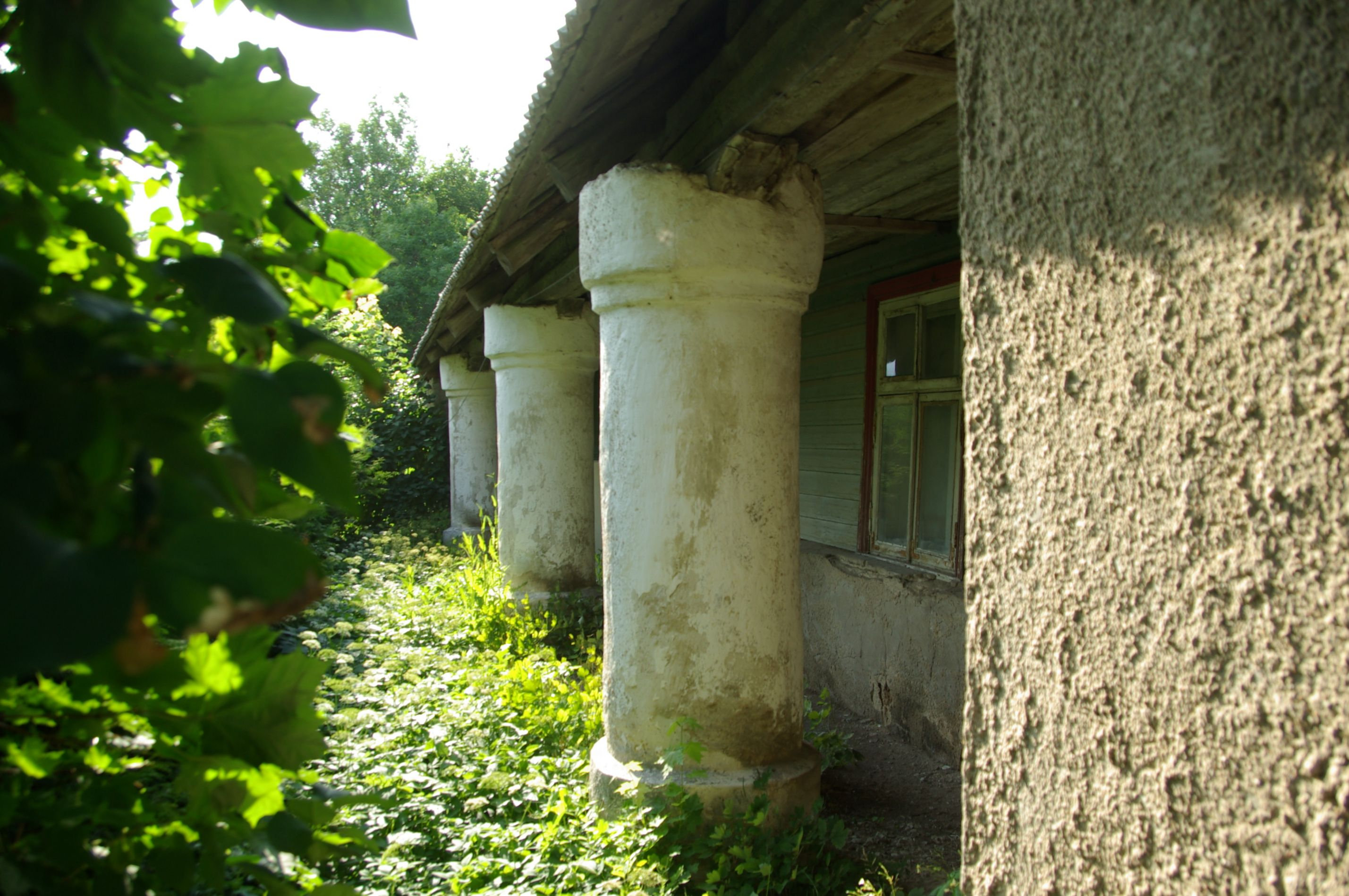 Harju maakond, Kuusalu vald, Valkla küla